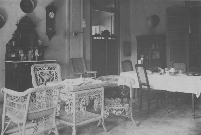 Foto. Interieur van het huis van Europeanen in Tjikadjang